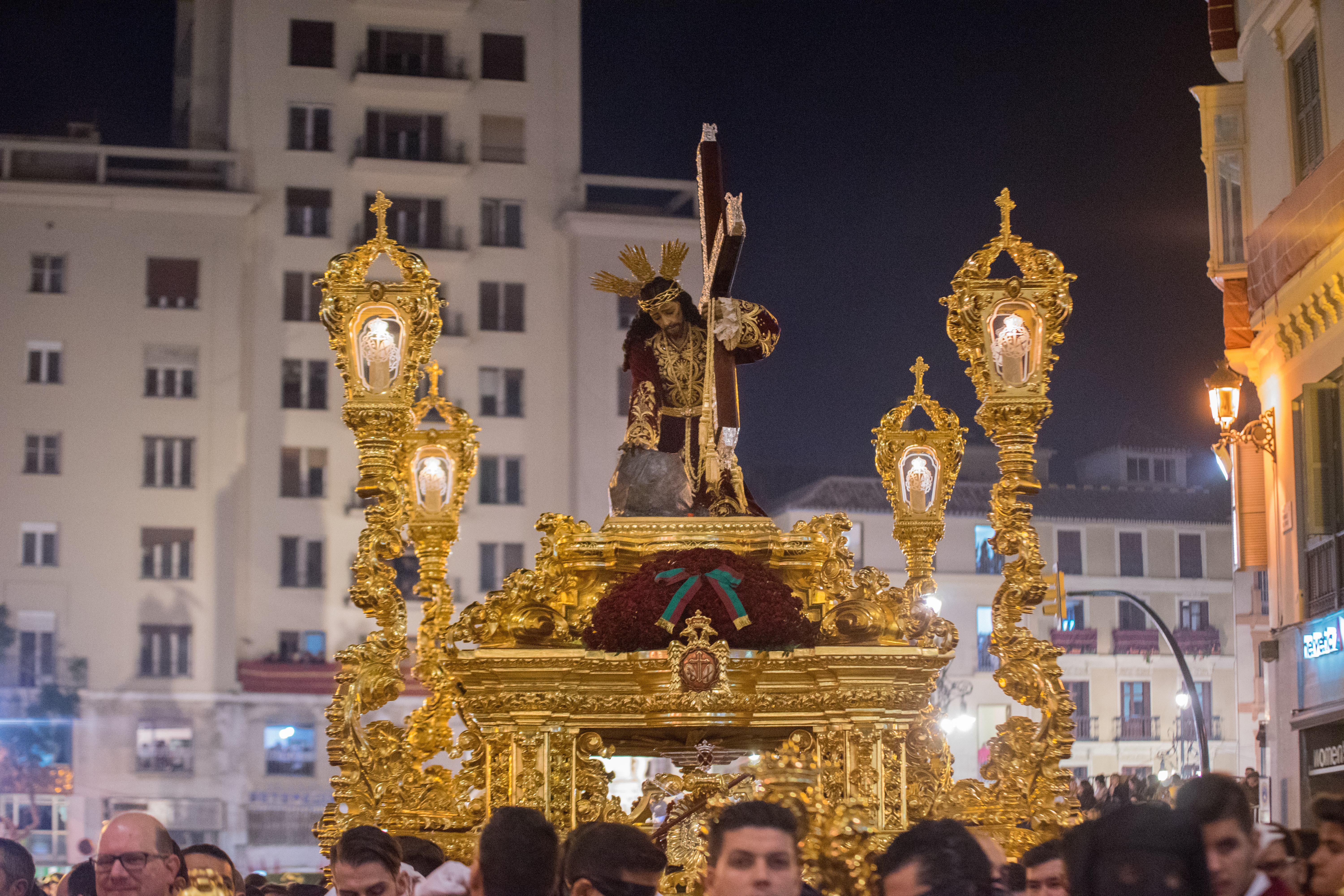 Trono del Jesús de la Misericordia Real Ilustre y Venerable Cofradía de Nuestro Padre Jesús de la Misericordia, Santo Cristo de Animas, Nuestra Señora del Gran Poder y San Juan de Dios This is a photography of a Folklore festival in Spain (Wikidata id Q9075883).